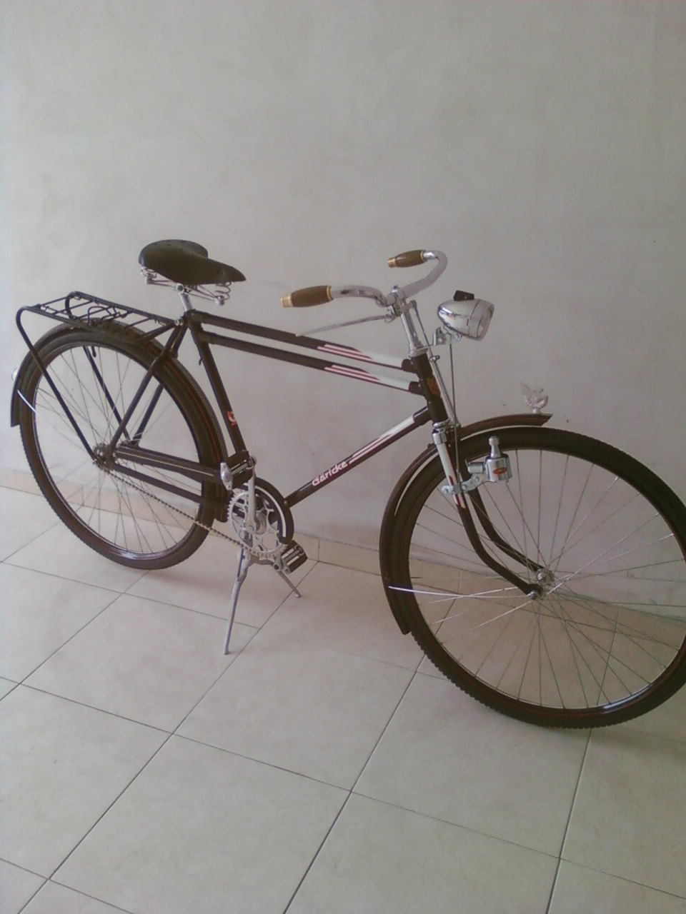 Bicicleta Antiga